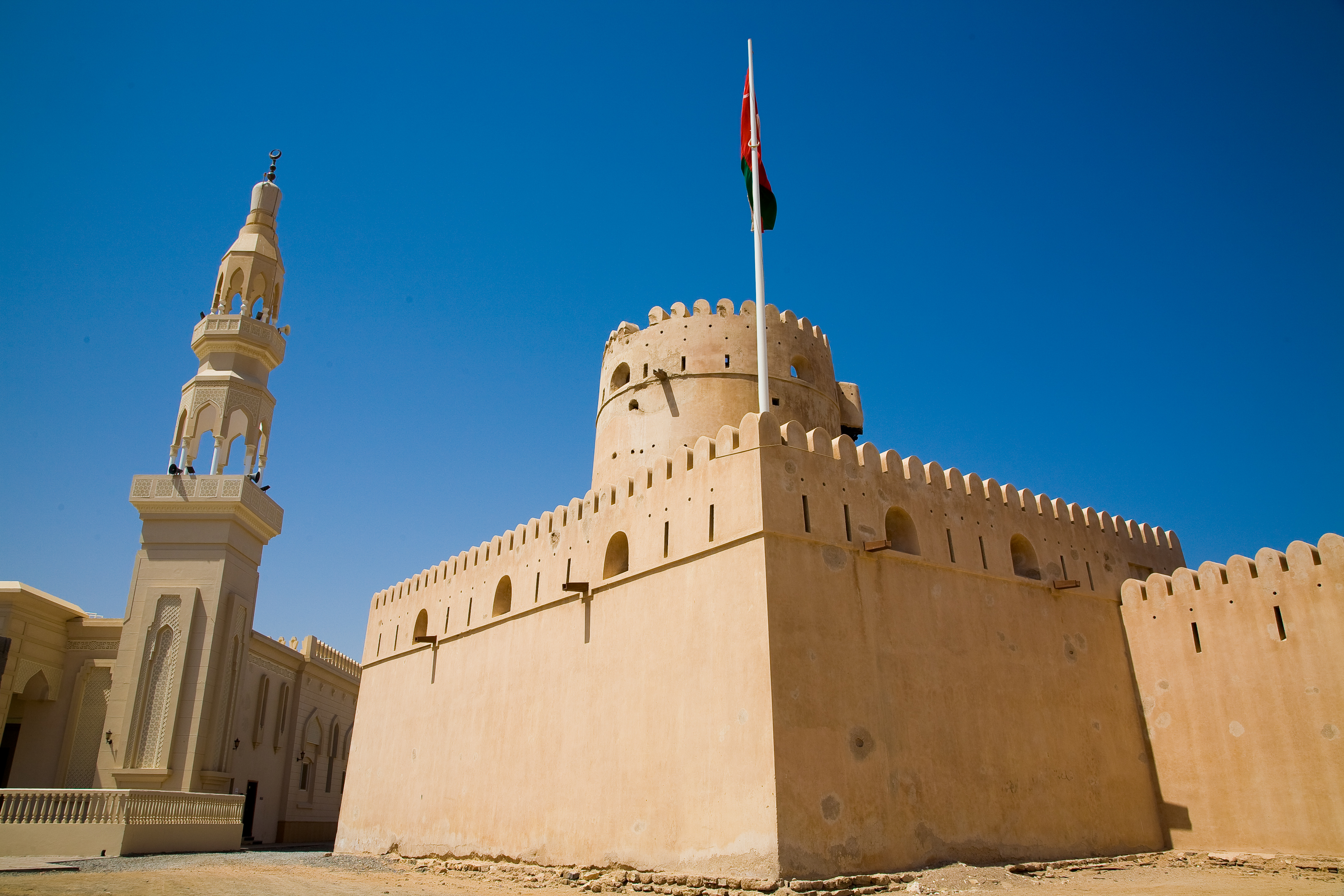 Sur, Oman